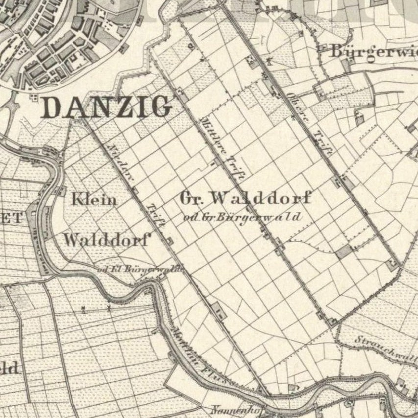 Olszynka Mała (po lewej) i Olszynka Wielka (po prawej).